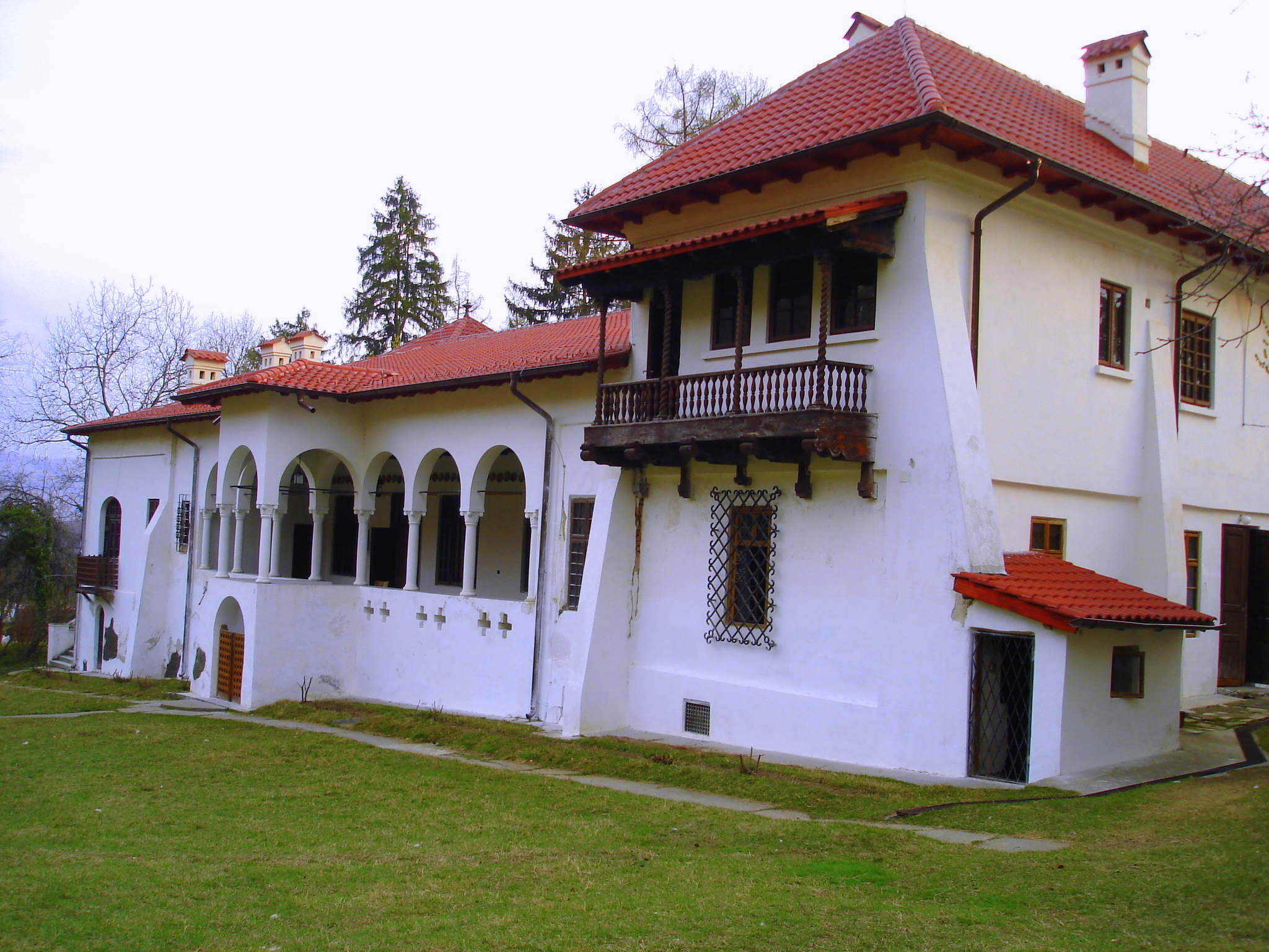 Vedere principala a conacului Nicolae Balcescu (sec. XIX - XX) din sat Valea Bălcească; comuna Nicolae Balcescu